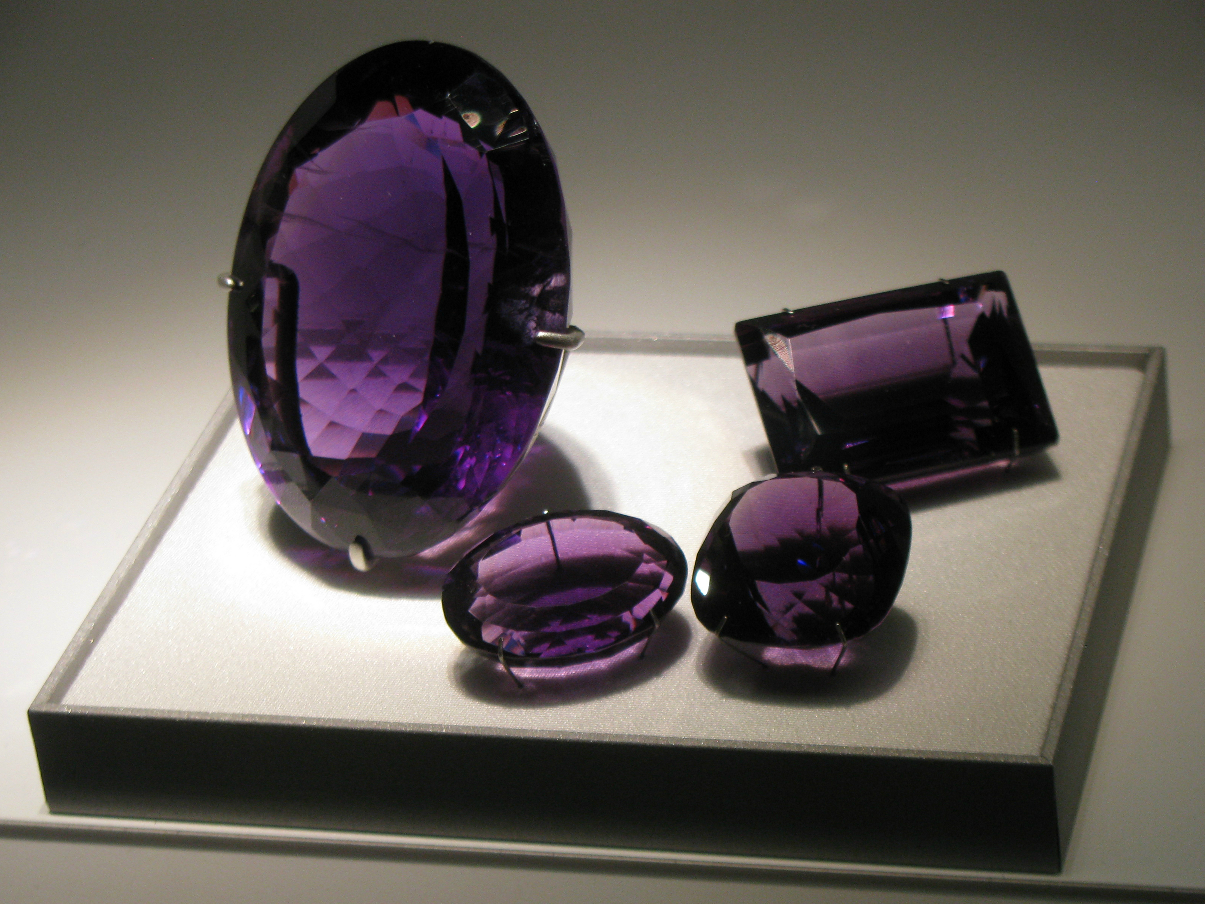 Zdjęcie przedstawiające biżuterię z ametystem English | Polski | +/−